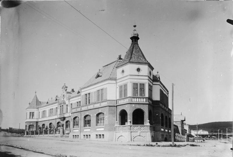 China, Tsingtau, Katholische Mission China, Tsingtau. Gebäude der katholischen Mission in Tsingtau.